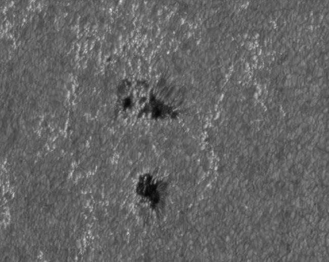 光斑